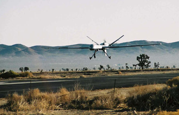 Drone MQ-9 Reaper de l'US Air Force a l'atterrissage